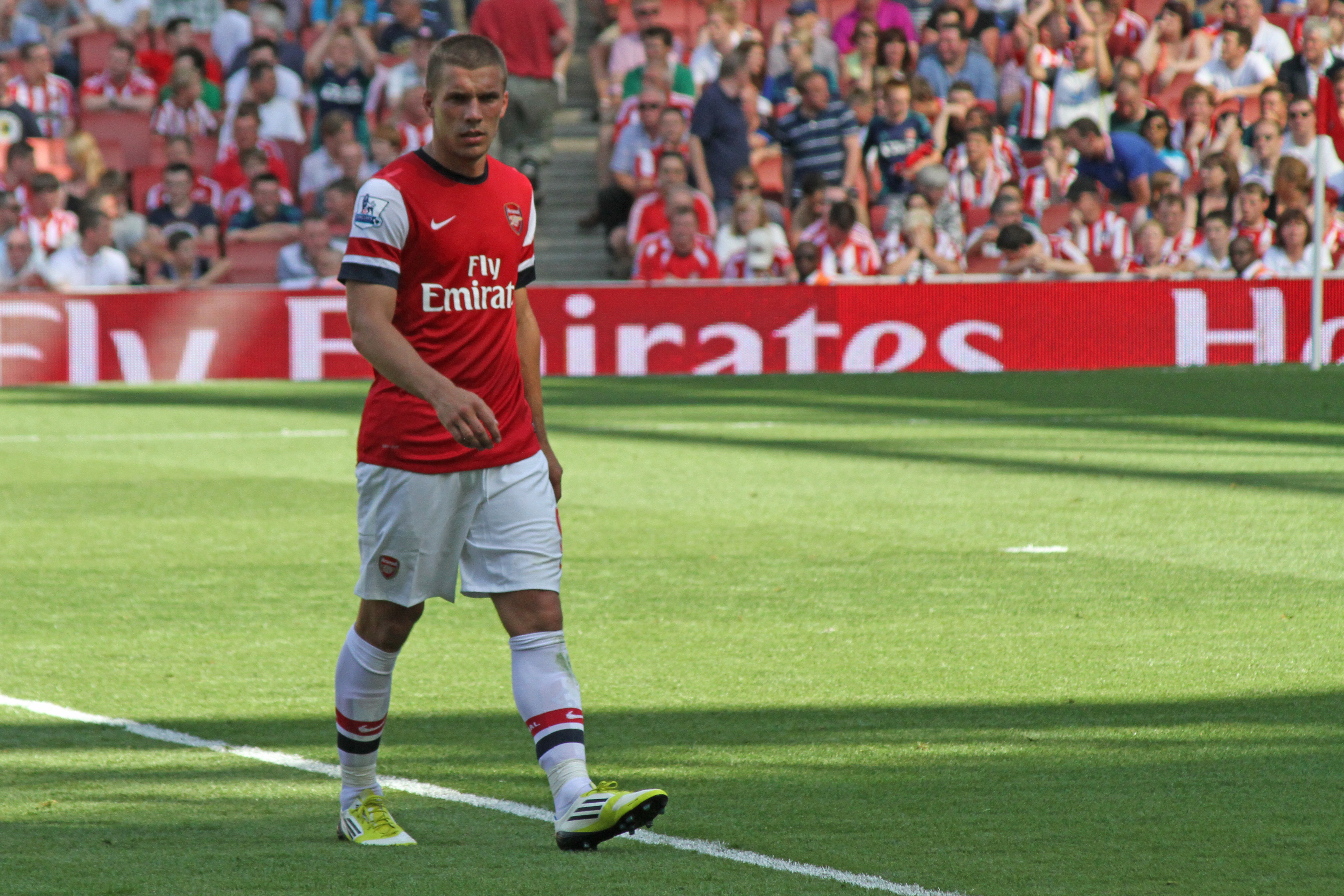 Lukas Podolski